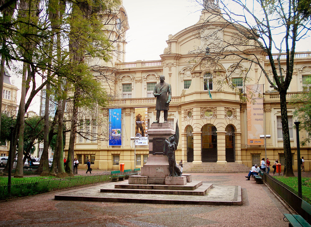 Monumento ao Barão do Rio Branco em Porto Alegre, Brasil. Ao fundo o Memorial do Rio Grande do Sul